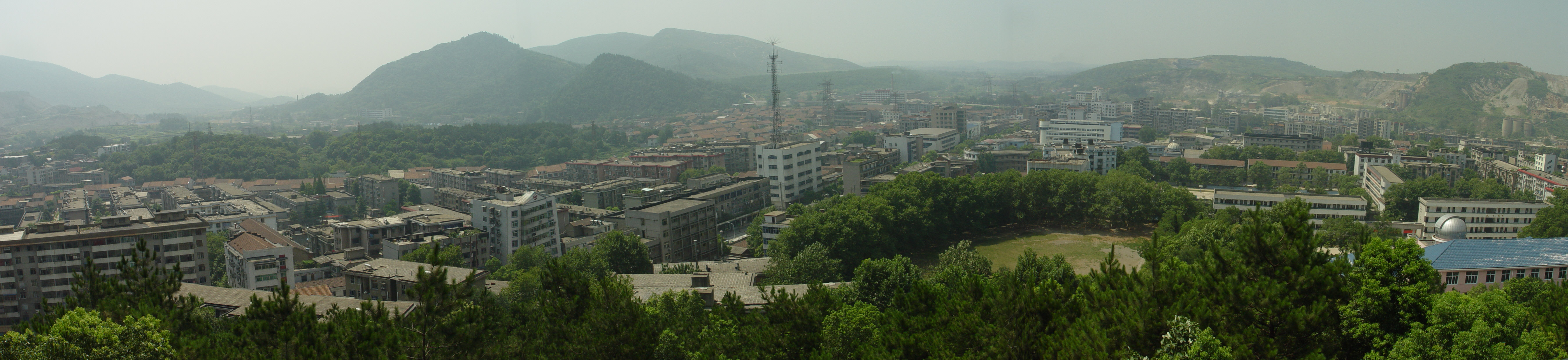 黄石市铁山区鹿章山眺望全景